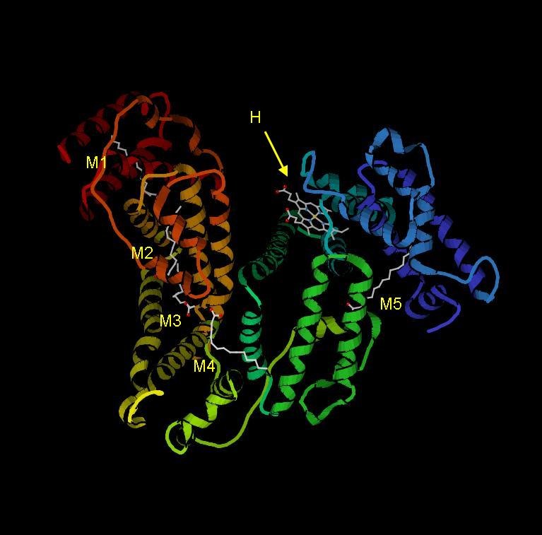 Albüminin miristik asit ve hem grubuna bağlanmış hali. H, hem; M1-M5, miristik asit. Protein zinciri, izlenmesini kolaylaştırmak için, maviden kırmızıya doğru geçişen renklerle gösterilmiştir. Protein Databank'da [1] 1N5U [2] kayıtlı koordinatların KiNG görüntüleyicisi ile elde edilmiş resmidir.